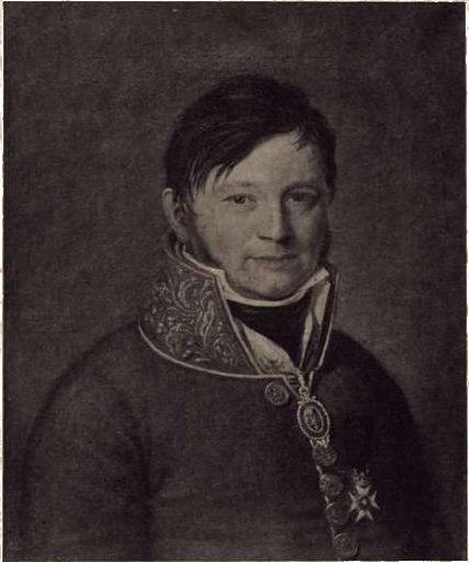 Amtmann i Buskerud amt Johan Collett (1775–1827). Maleri av Jacob Munch.